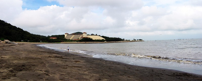 澳門黑沙海灘。